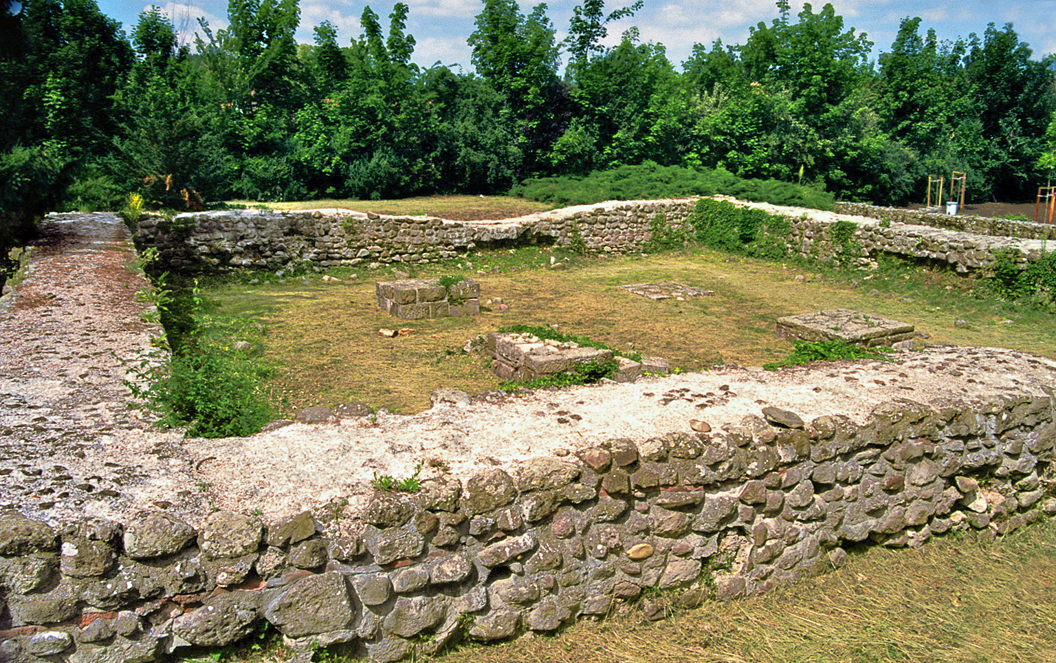 Burgus Leányfalu/Ungarn - Burgus Cirpi 2: Blick von Südwesten.